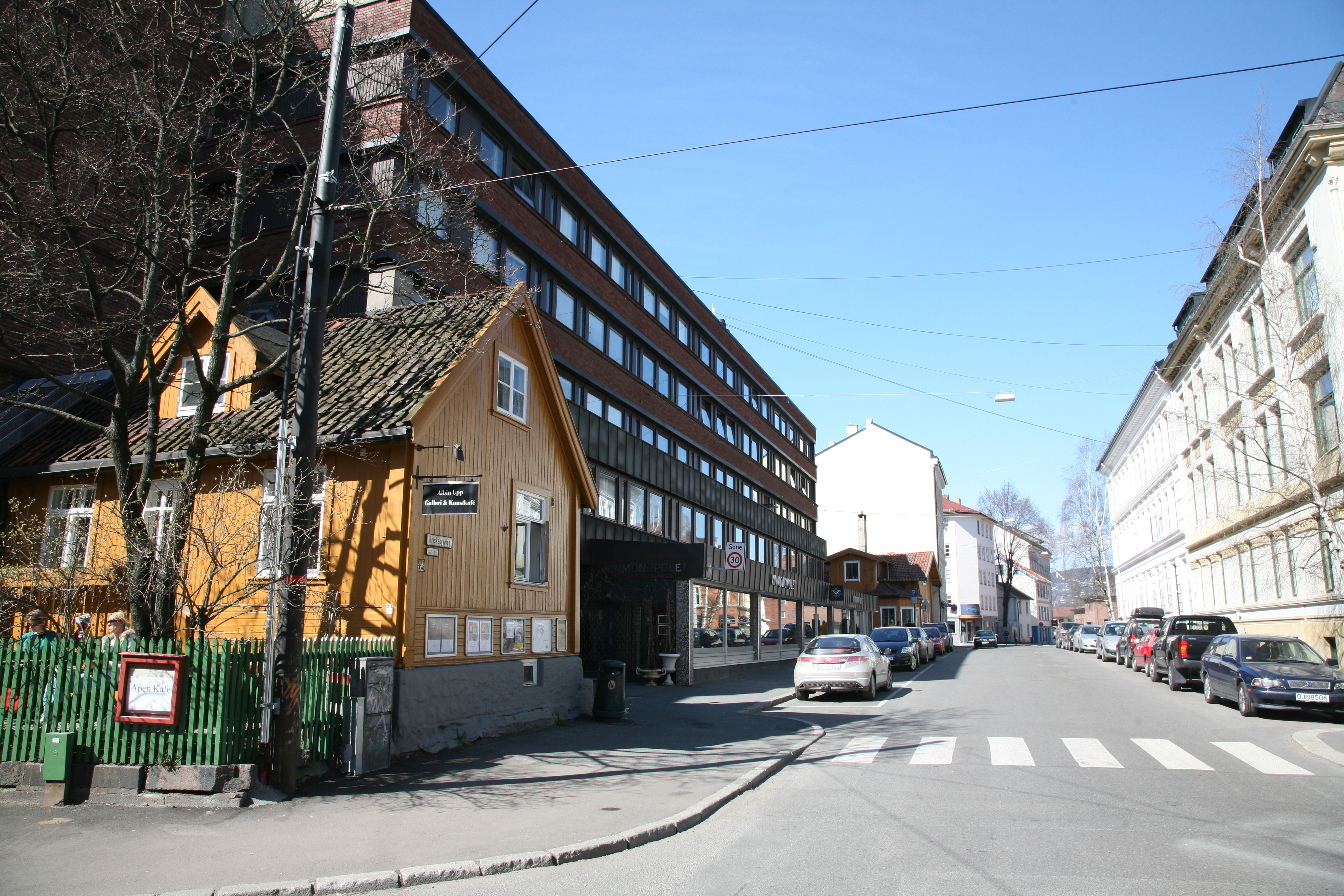 From Briskebyveien in Oslo, Norway. In the foreground Briskebyveien 42